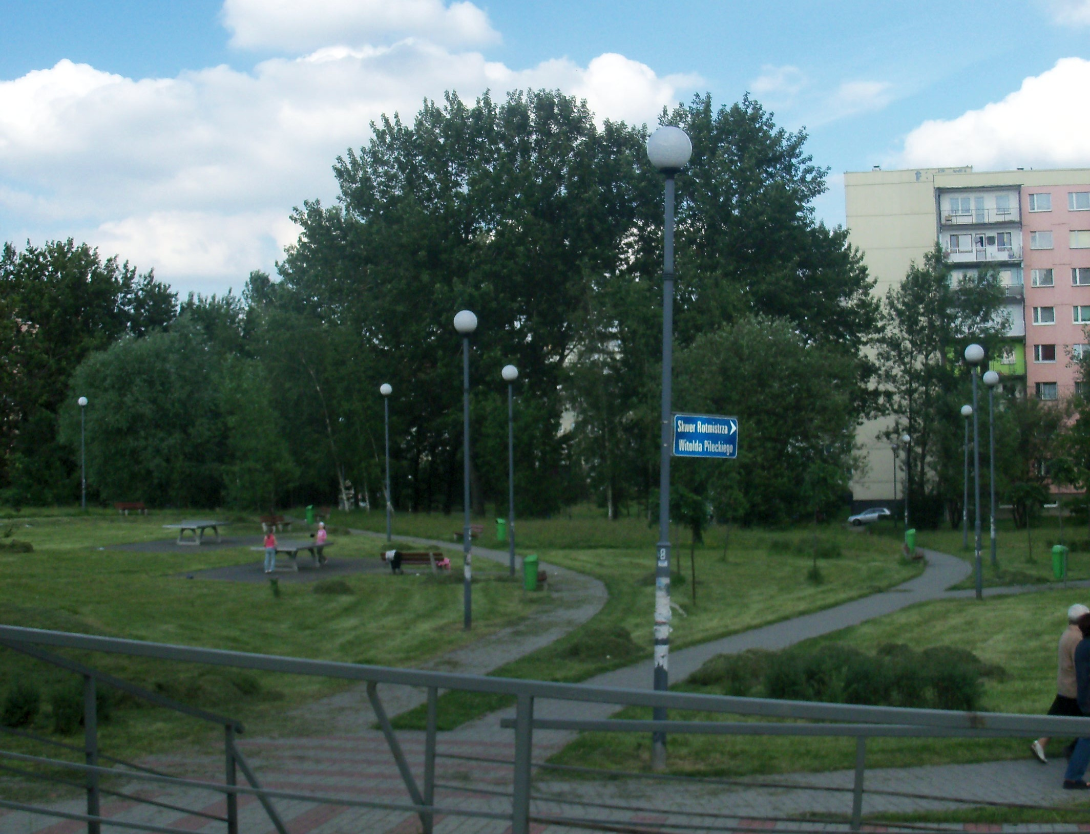 Skwer Rotmistrza Witolda Pileckiego na Osiedlu Witosa w Katowicach